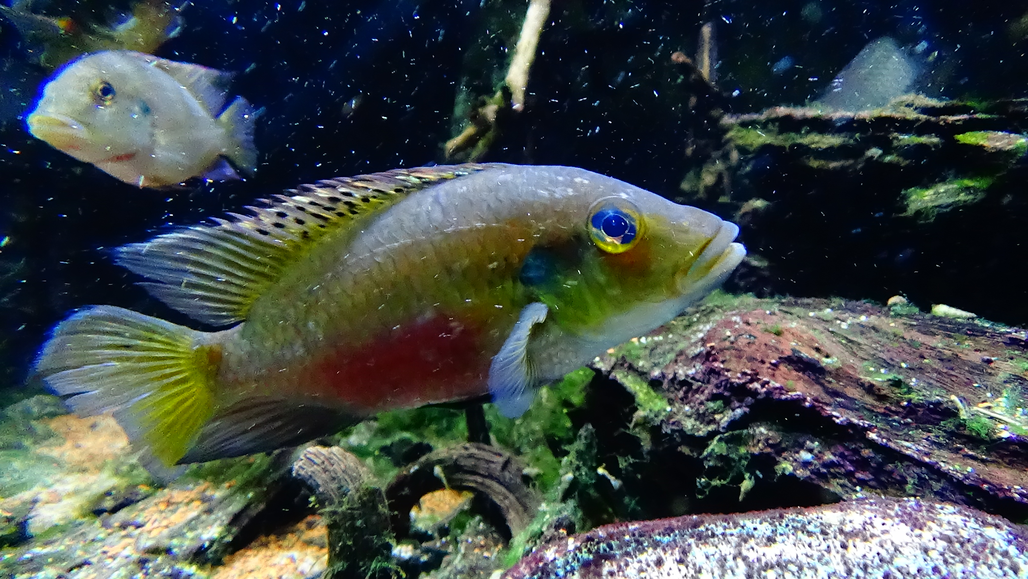 Chromidotilapia guntheri (femelle) - Aquarium Tropicale du palais de la Porte Dorée - 06/2015